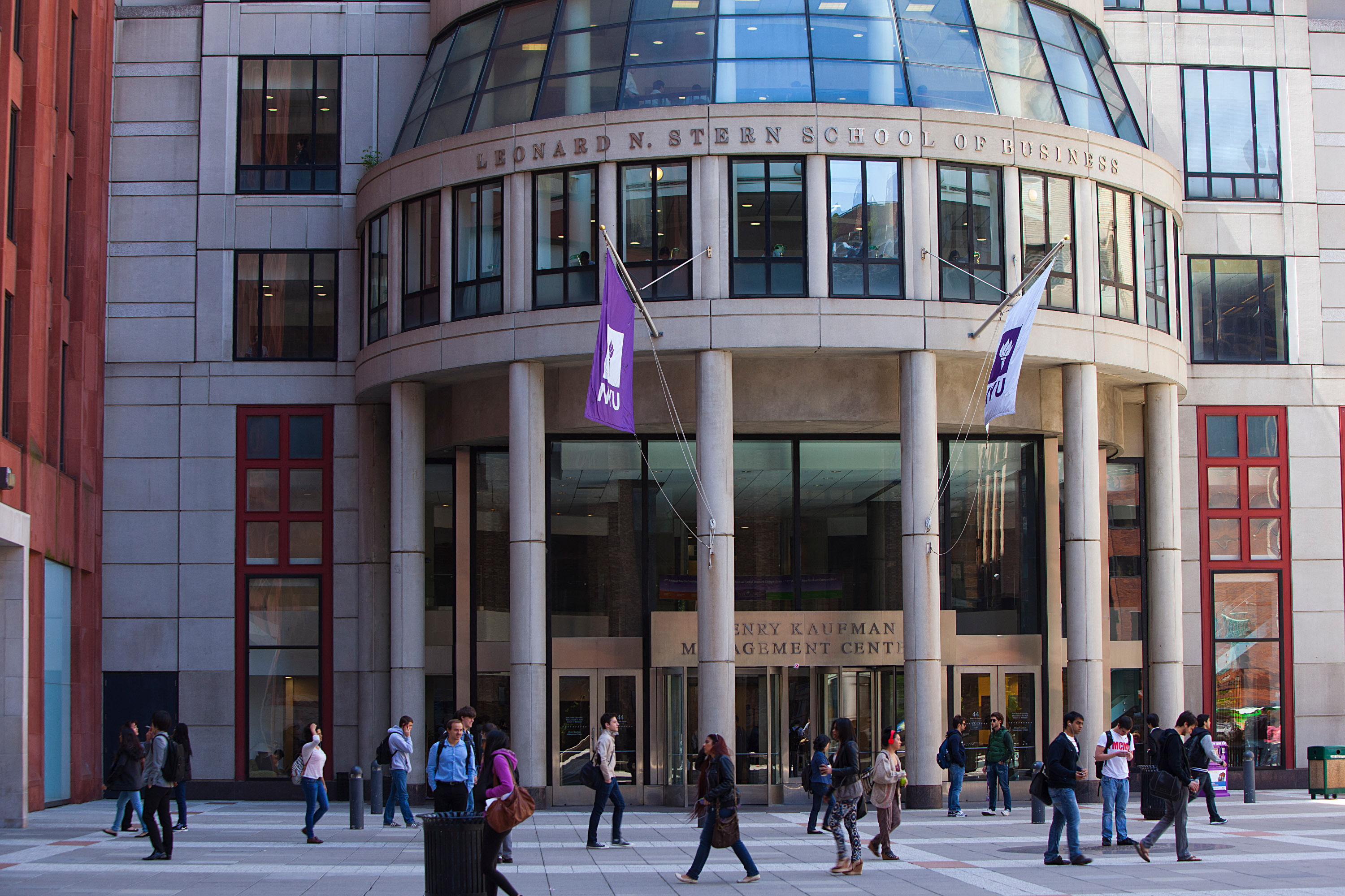 NYU-Stern